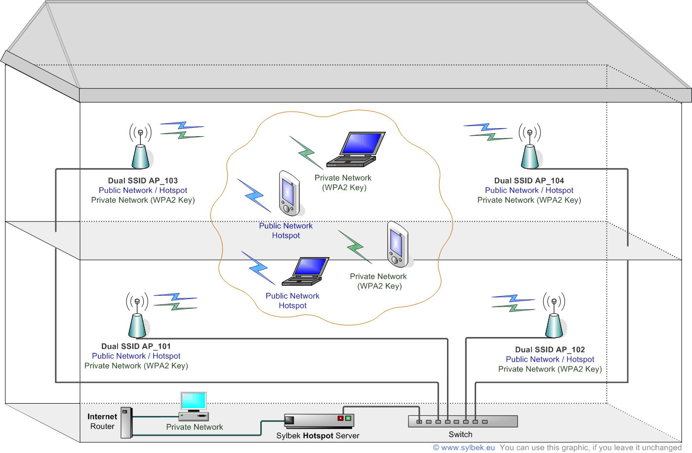 Монгол: Серверийн ерөнхий зохион байгуулалт